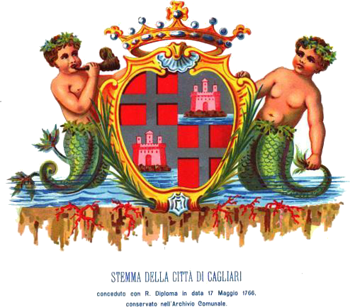 Riproduzione dello stemma di Cagliari di epoca sabauda.